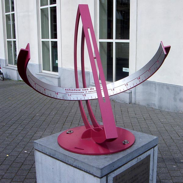 Equatoriale zonnewijzerr in de Guido Gezellestraat nabij het Stedelijk Museum in Hasselt